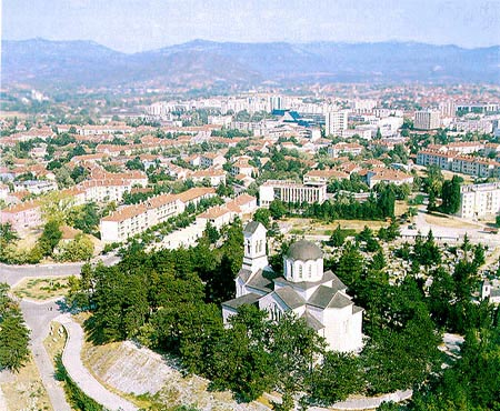 Nikšić